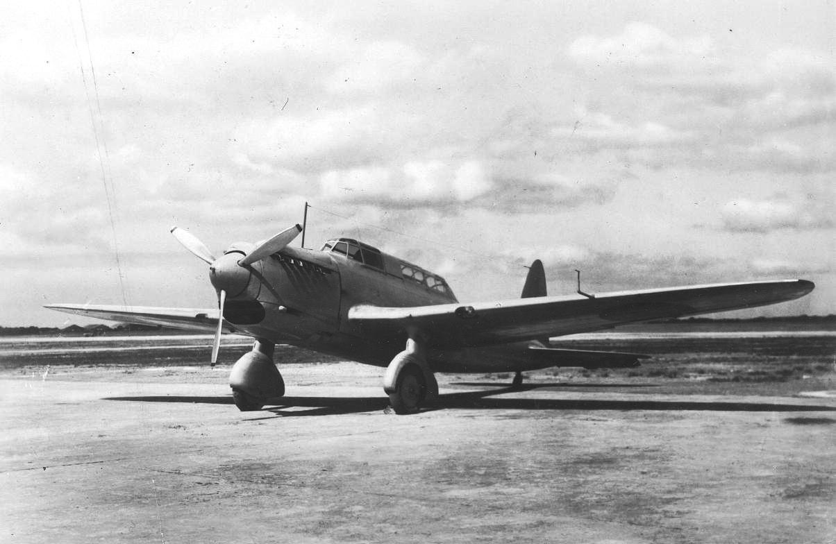 浜松で撮影された、98式軽爆撃機。